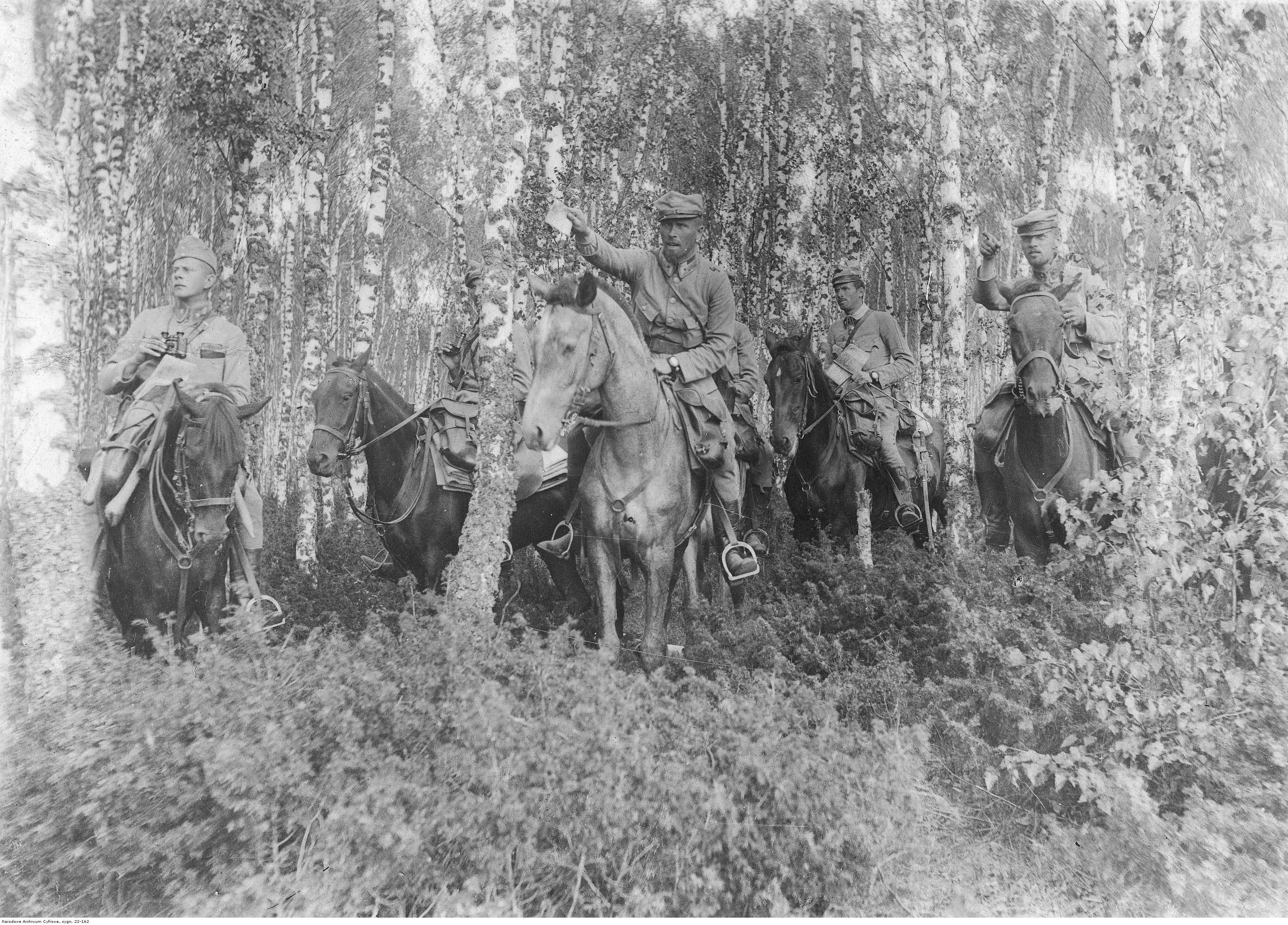 Major Andrzej Galica (3. z lewej) w lesie na Wołyniu wydaje rozkazy (zdjęcie zostało wykonane mniej więcej w okresie bitwy pod Kościuchnówką/ Kostiuchnówką).